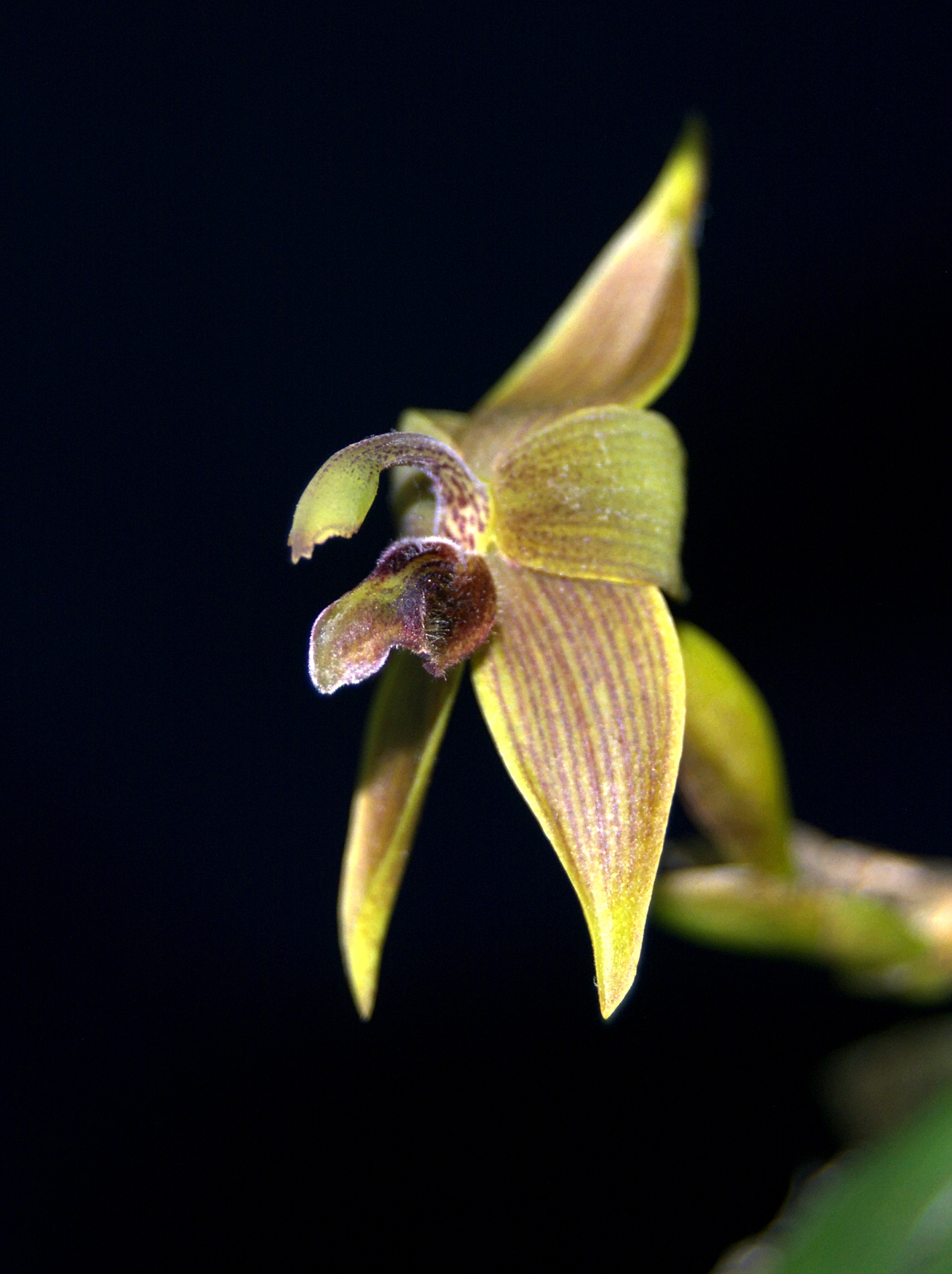 Planta de clima frio, colectada aproximadamente a 2500m.s.n.m al Sur de la Ciudad de Loja (Ecuador), fotografia tomada en laboratorio.